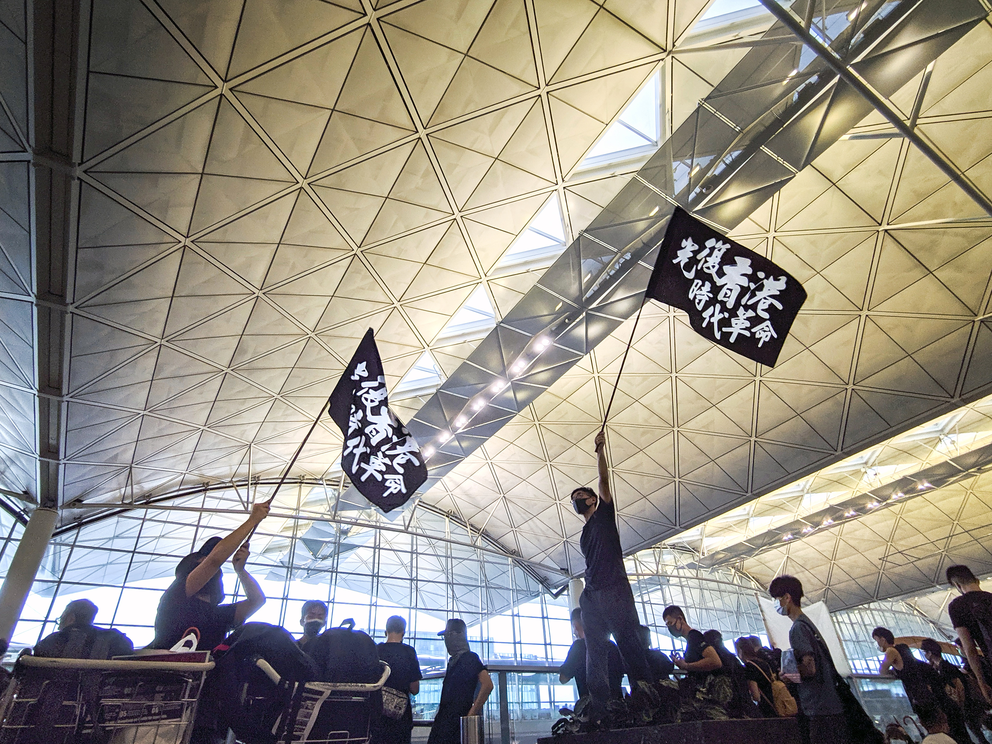 IMG_20190812_170957